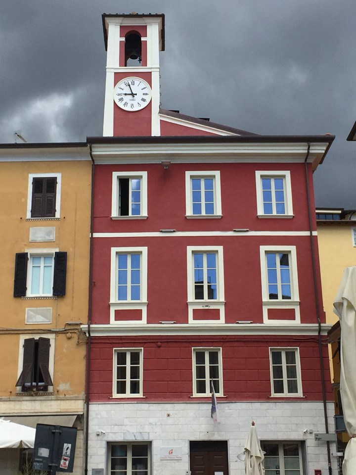 foto palazzi